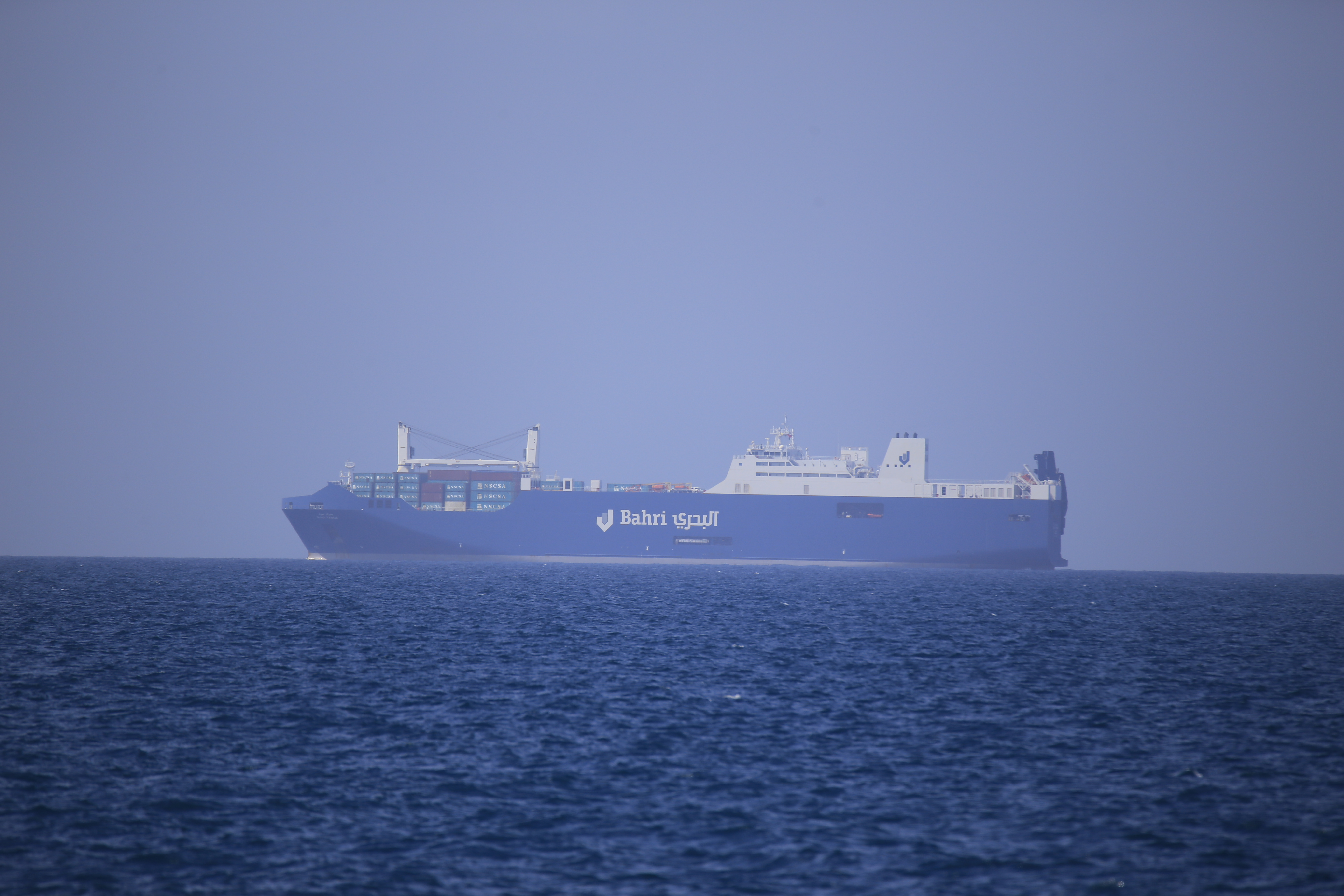 Nave cargo BAHRI TABUK IMO:9620968